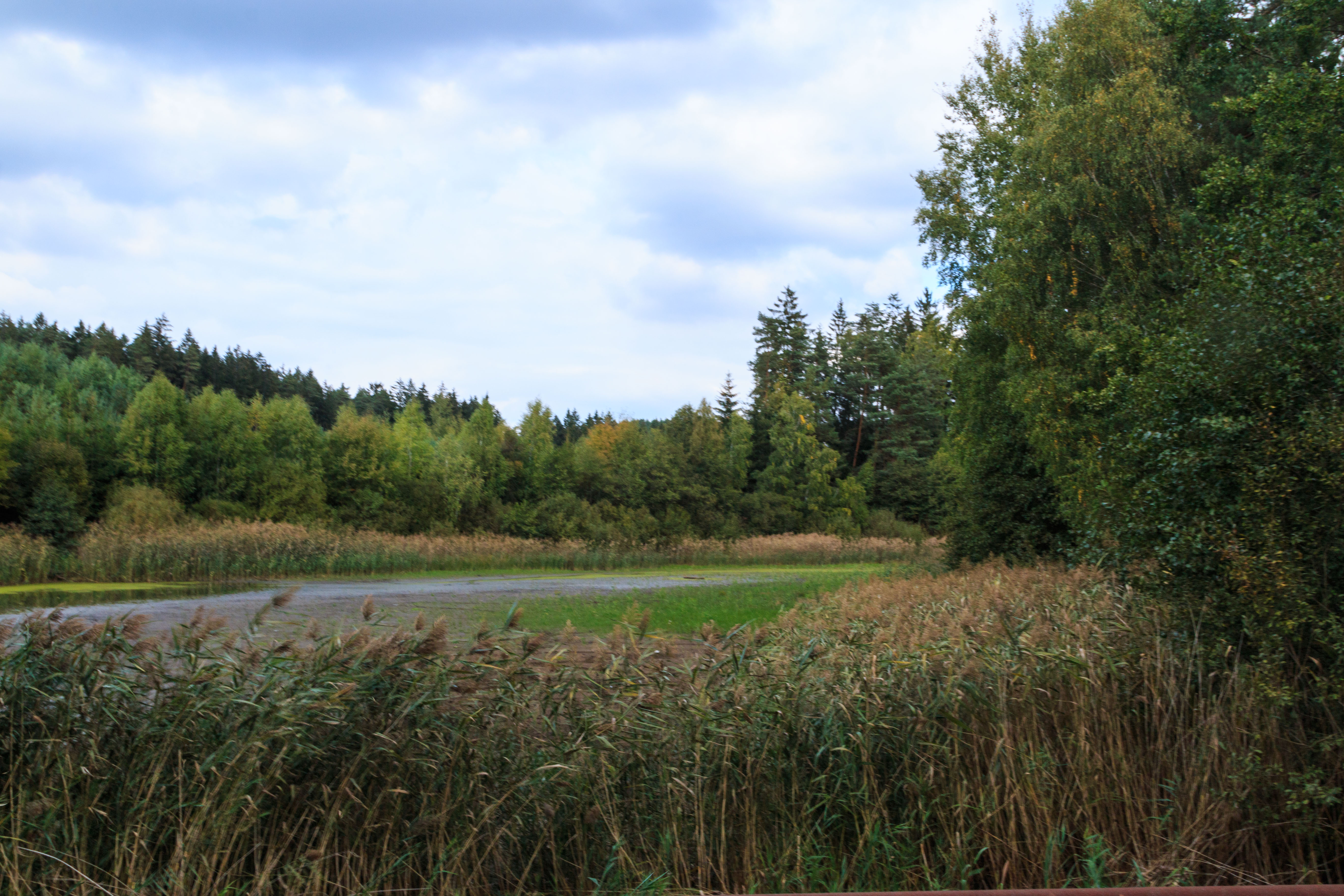 Novodvorský rybník III Project: Vodstvo.